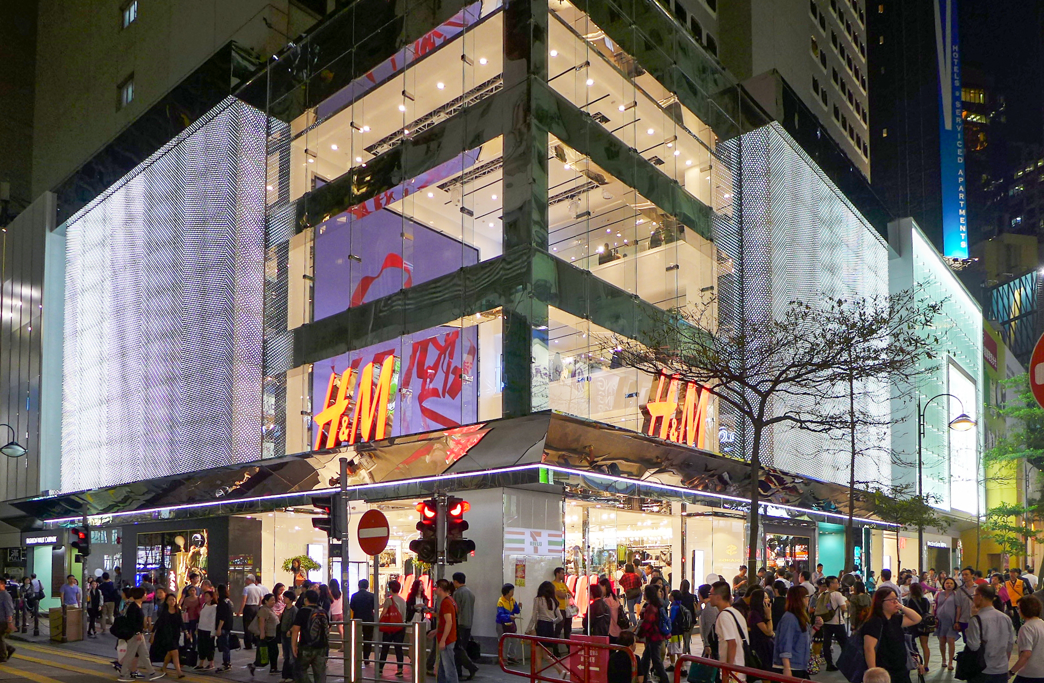 H&M Flagship store in Causeway Bay, Hong Kong